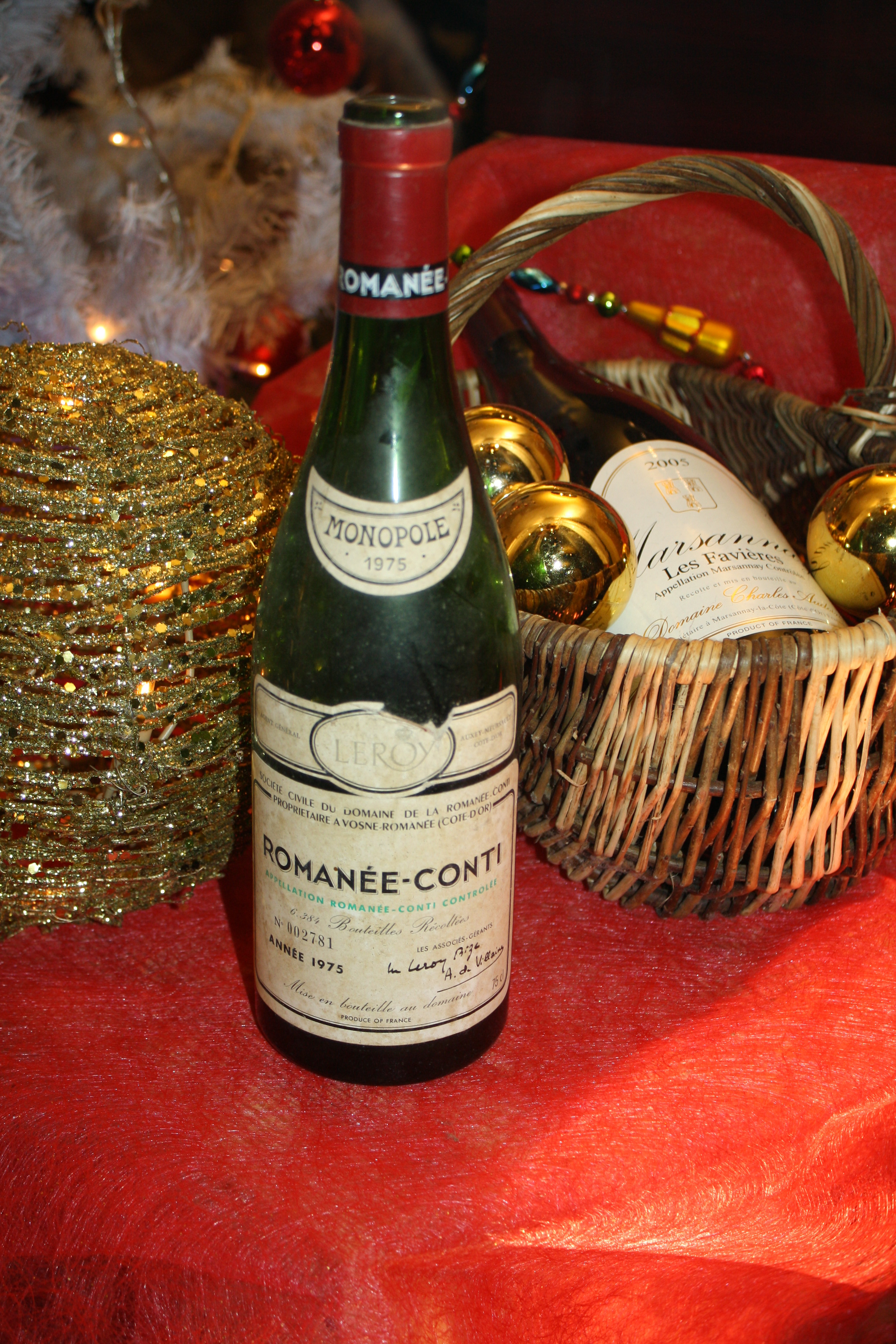 Bouteille (vide) de Romanée-Conti, l'un des plus grands vins du monde. Vin rouge de Bourgogne en France.